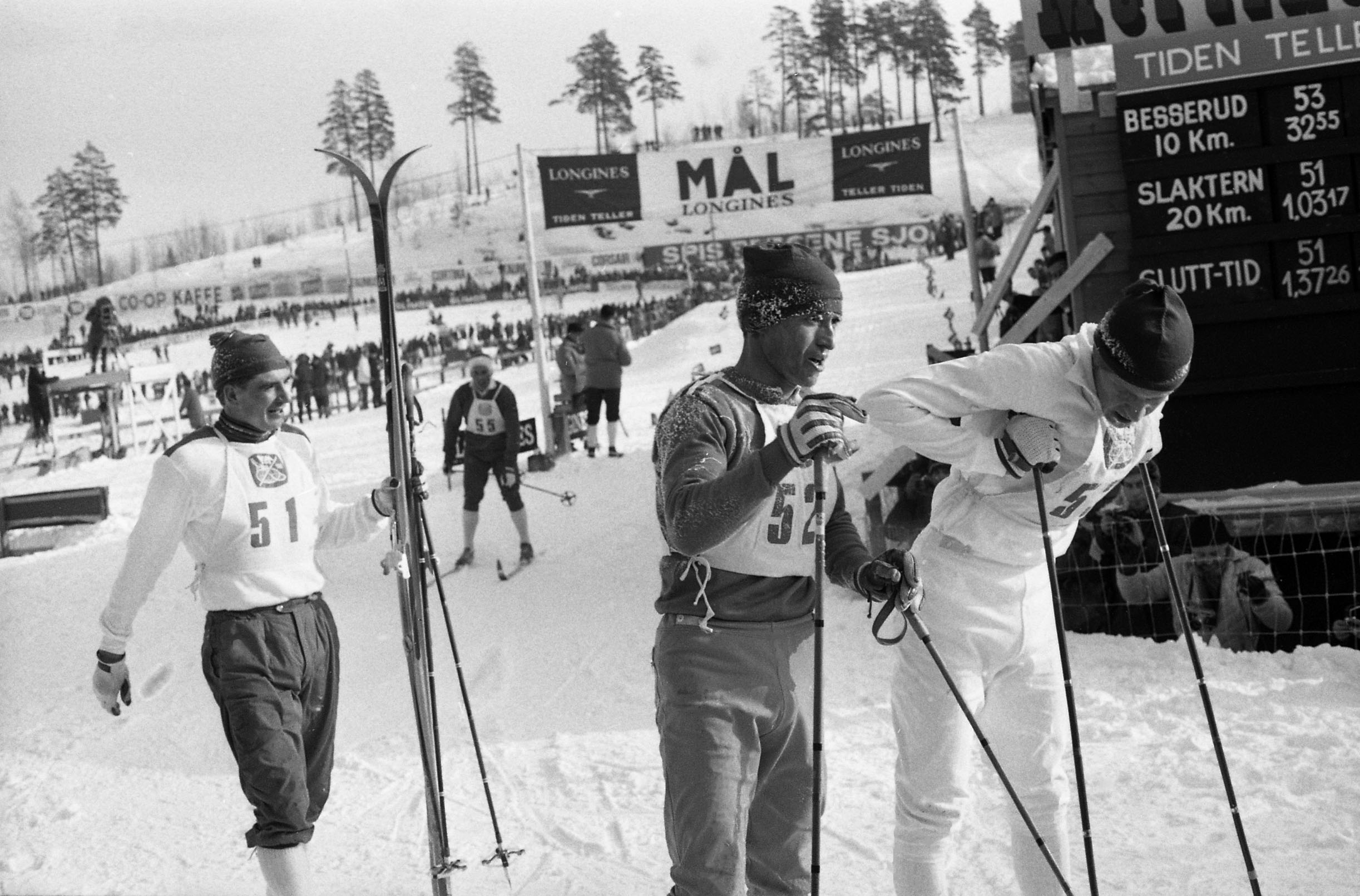 Beskrivelse: Eero Maentyranta fra Finland (51) og Franco Nones fra Italia (52) etter målpassering i Holmenkollen Sted: Oslo År: 1966 Fotograf: Billedbladet NÅ/ Klæboe Arkivref.: RIKSARKIVET- RA/PA/0797/U/Ua/3903_4B_13A